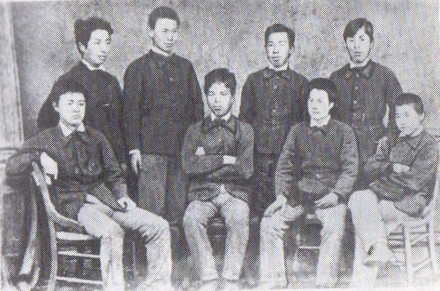 札幌農学校第二期生、新渡戸稲造、内村鑑三、宮部金吾など